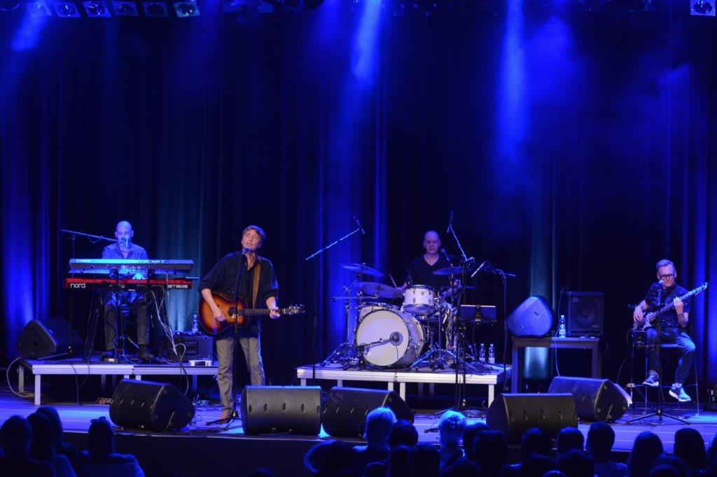 Günter MO Mokesch & Band